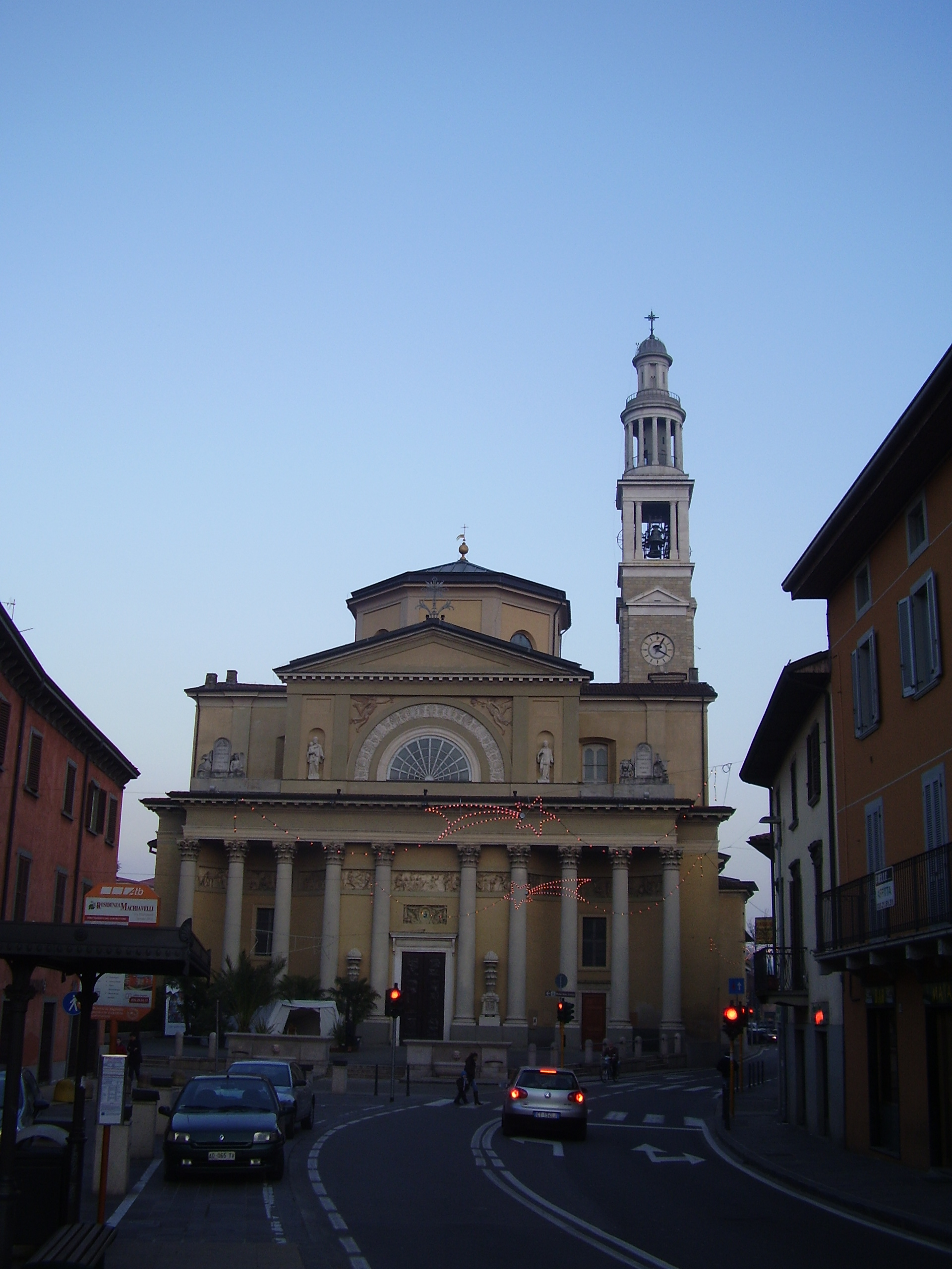 Приходской храм в Сериате